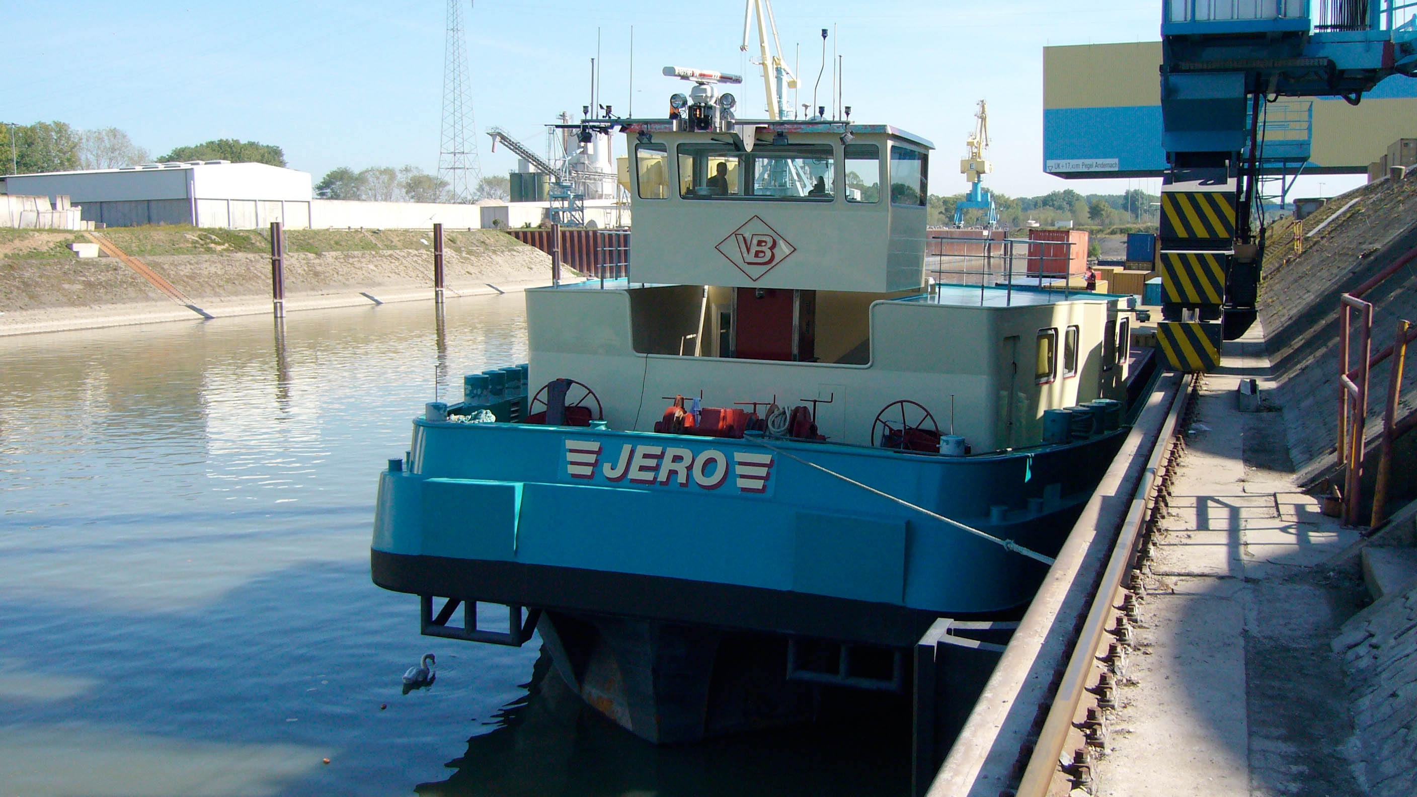 Vorschiff mit Wohnung